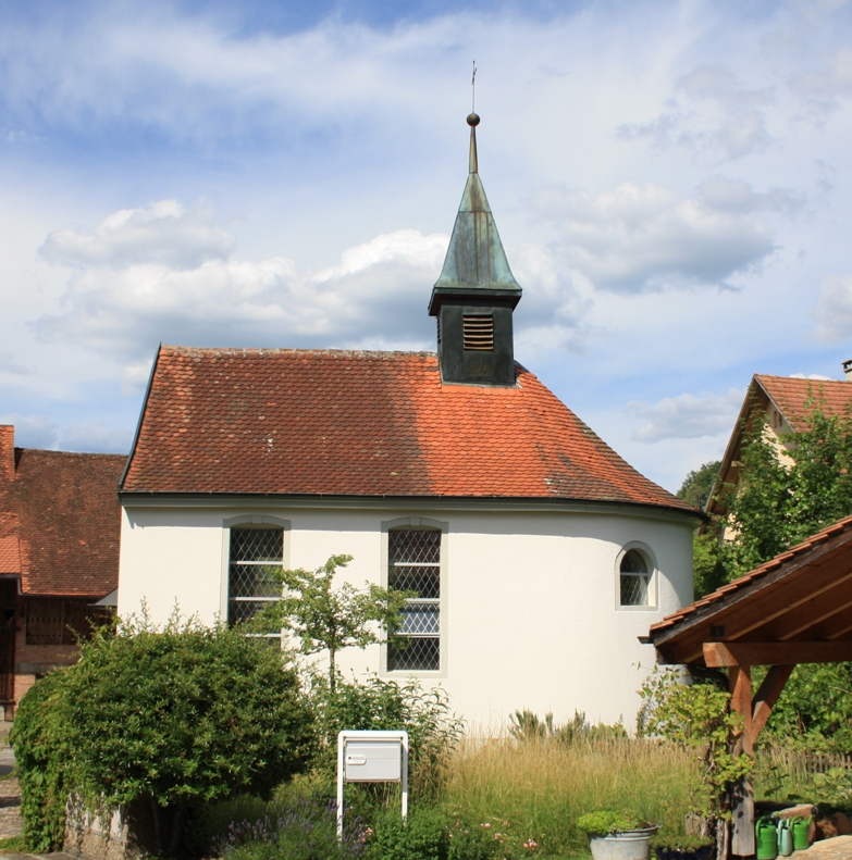 Kapelle Oberzeihen